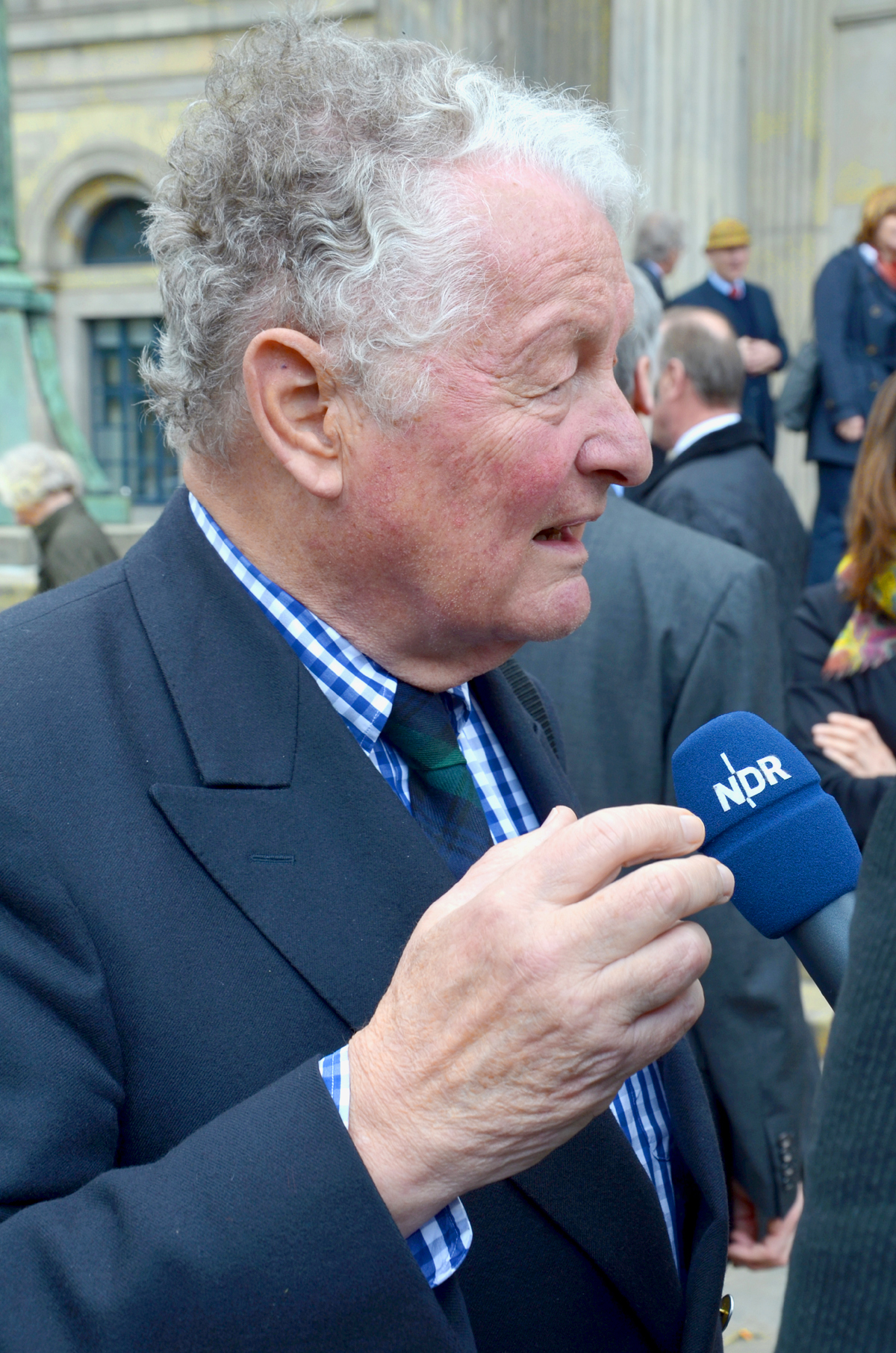 Zur Festveranstaltung im Opernhaus in Hannover anlässlich der Eröffnung der Niedersächsischen Landesausstellung 2014 unter dem Titel Als die Royals aus Hannover kamen erschien auch der Adelskenner Rolf Seelmann-Eggebert, hier im Interview vom Norddeutschen Rundfunk (NDR) ...